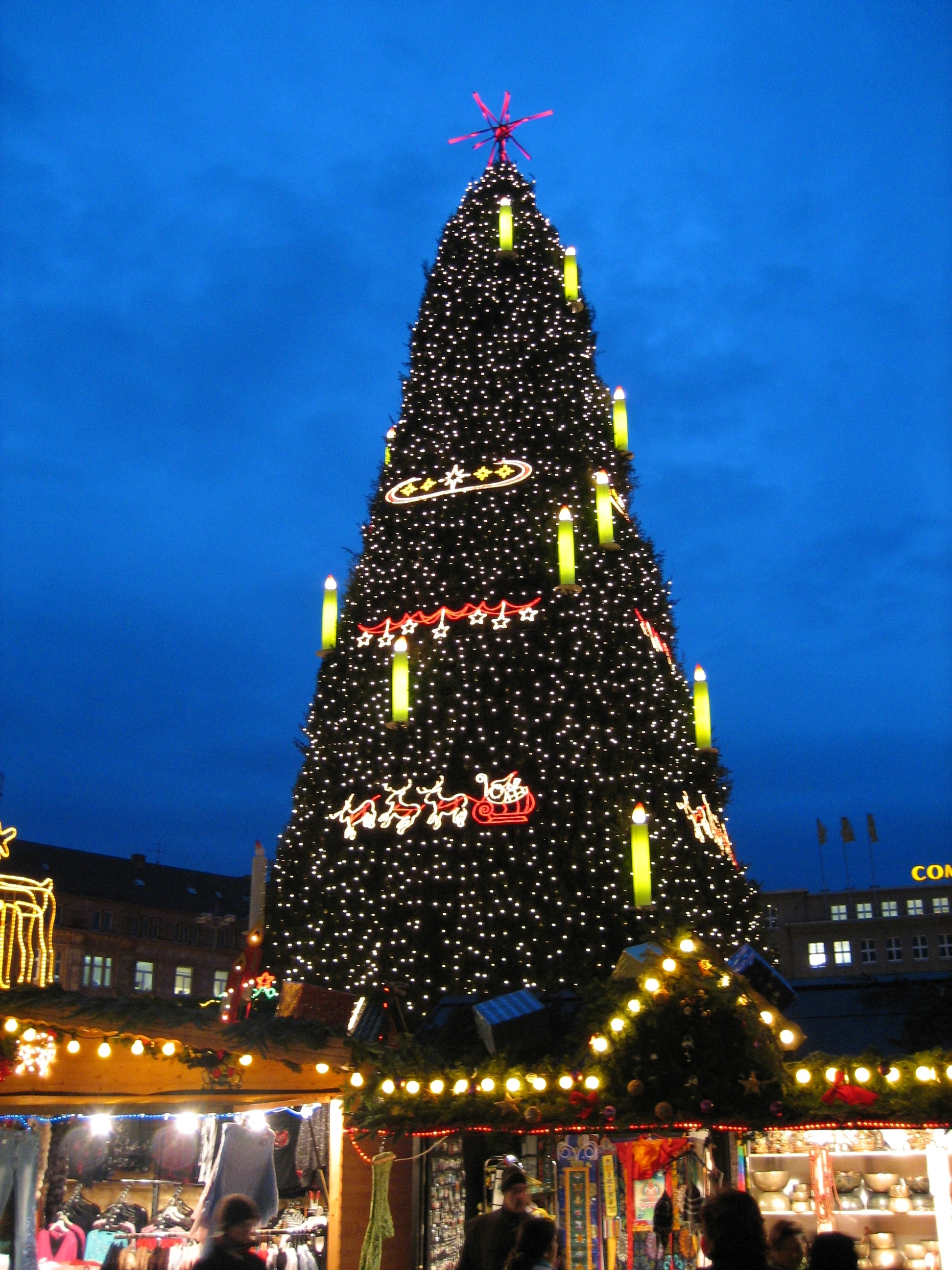 Weihnachtsbaum auf dem Dortmunder Weihnachtsmarkt